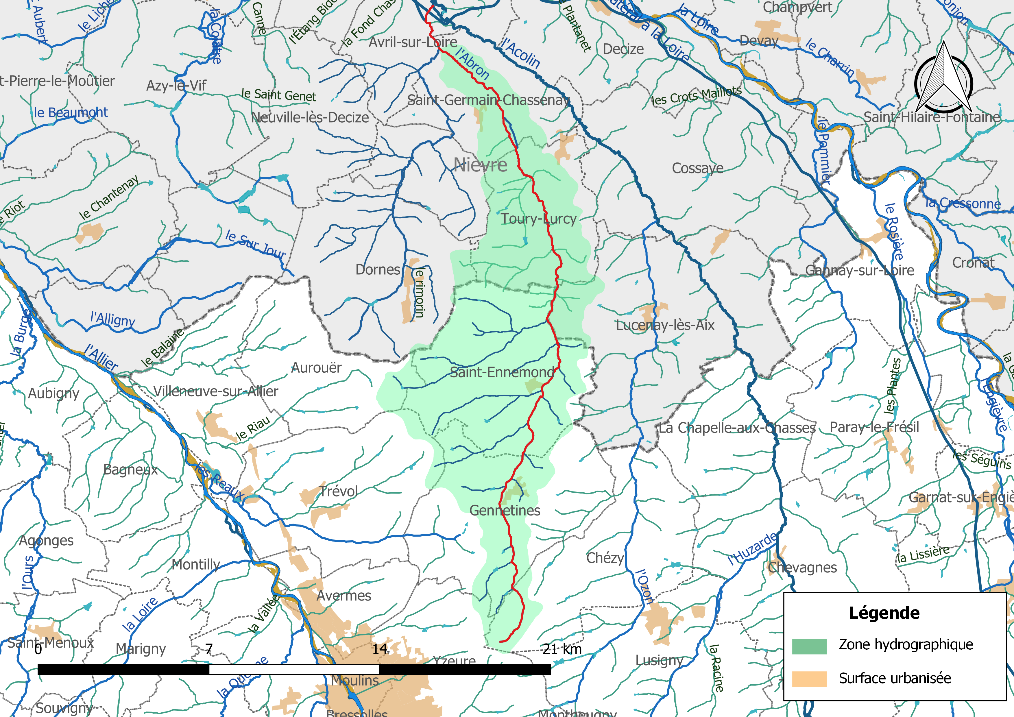 Carte du cours d'eau « l'Abron » (France) et de la zone hydrographique dans laquelle il s'insère.